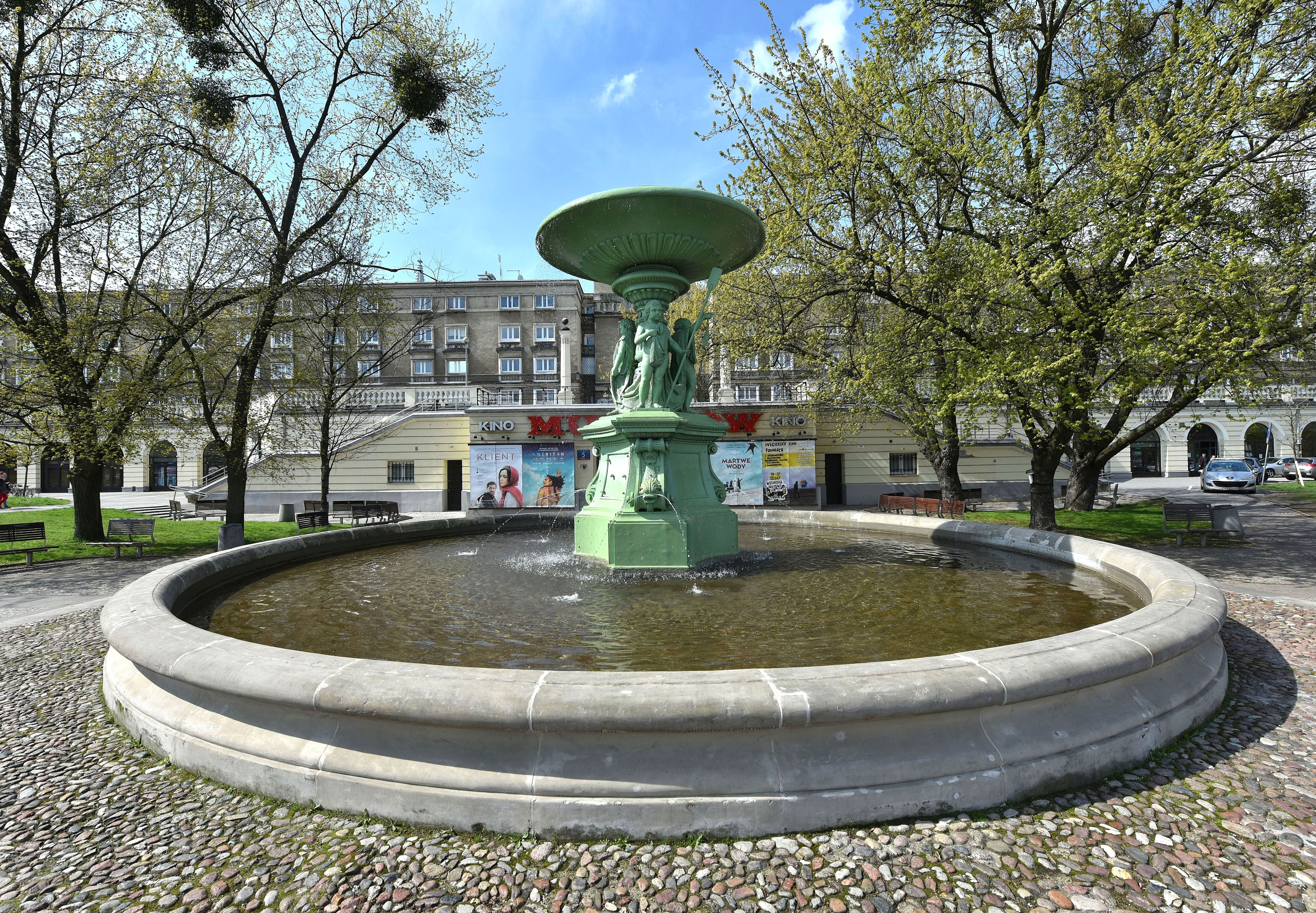 Fontanna na skwerze Batalionu Harcerskiego AK "Wigry"